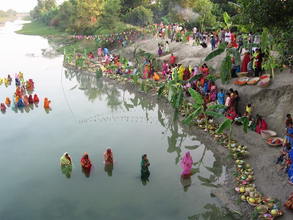 Chhat puja in nagar untari